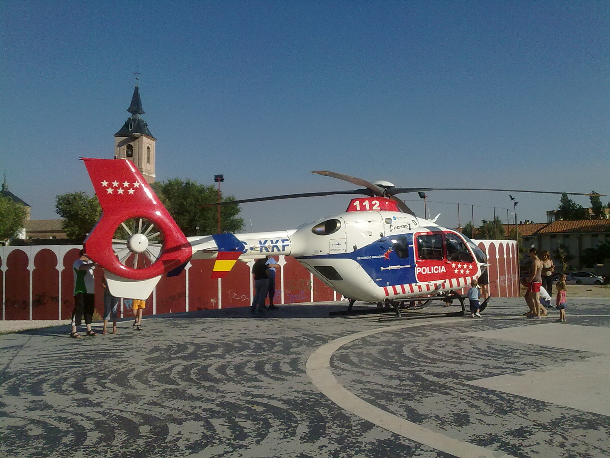 Helicóptero de la policia que aterrizó en el helipuerto de Daganzo una calurosa tarde de julio. La tripulación se limitó a estirar las piernas mientras los niños se subían al aparato. Por cierto, si nos atenemos a que la cruz marca el punto correcto de aterrizaje... la puntería fallaba un poco esa tarde .